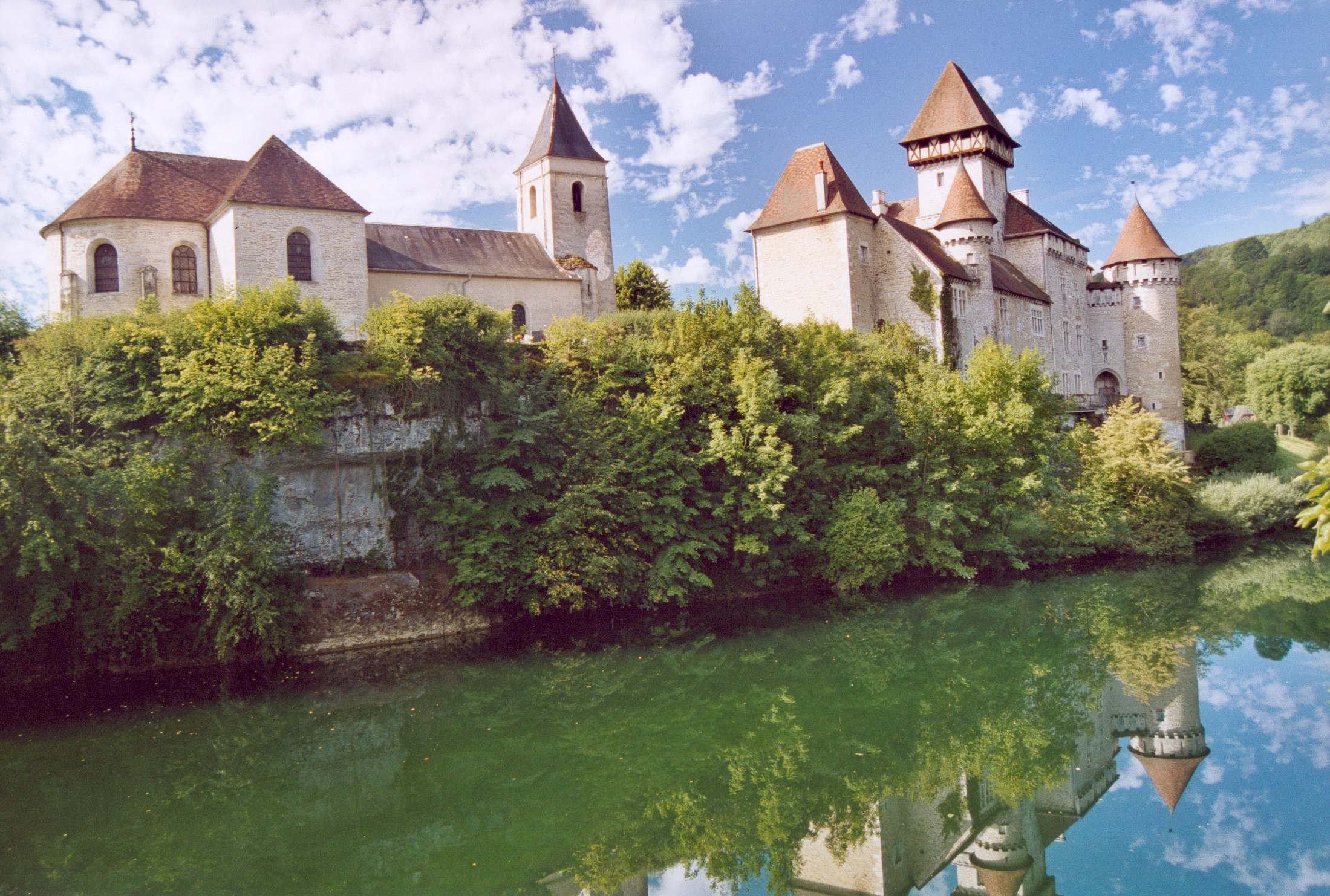 Cléron Doubs France Photographie prise par Patrick GIRAUD